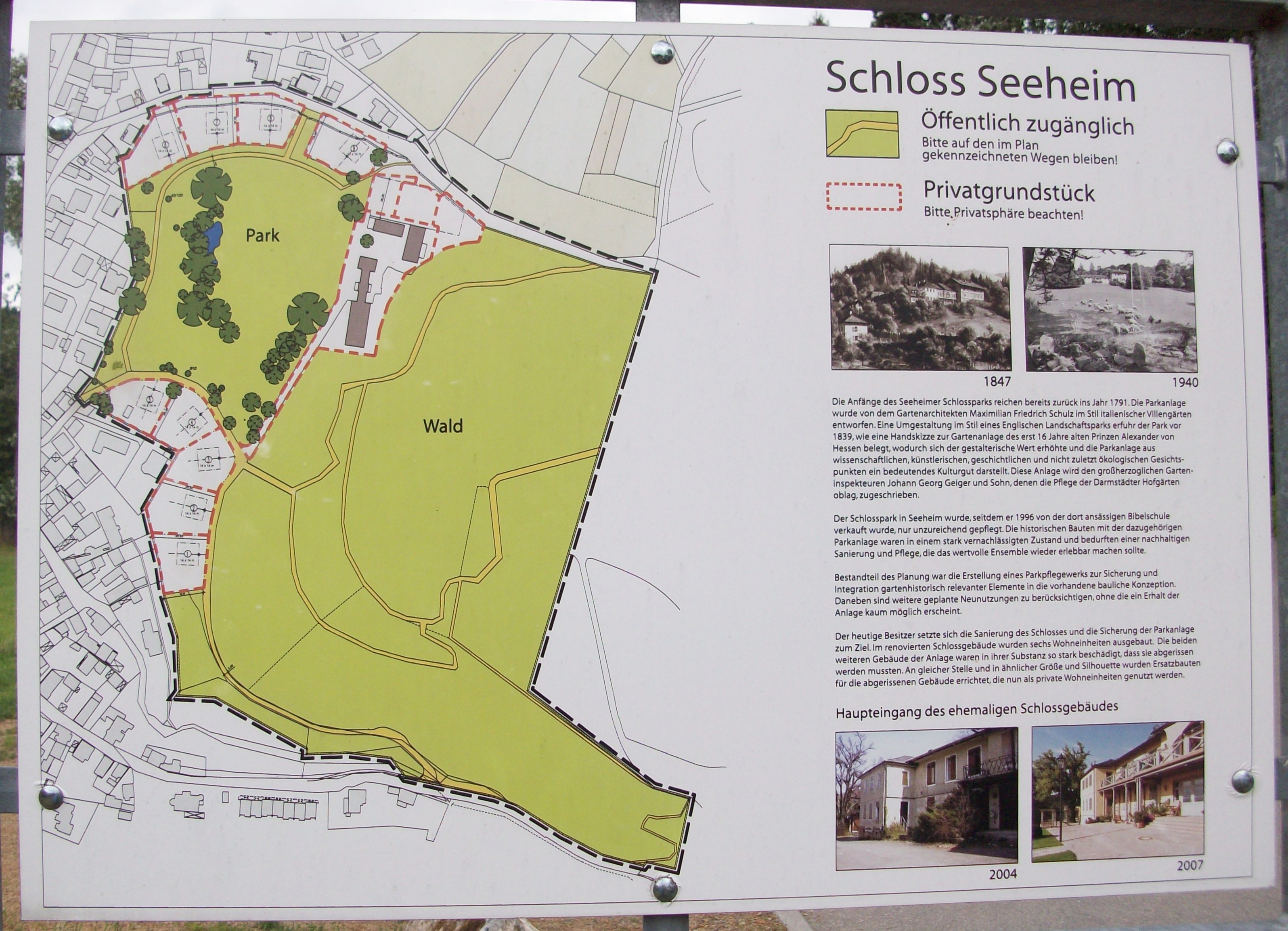 Informationstafel zu Park und Schloss Seeheim